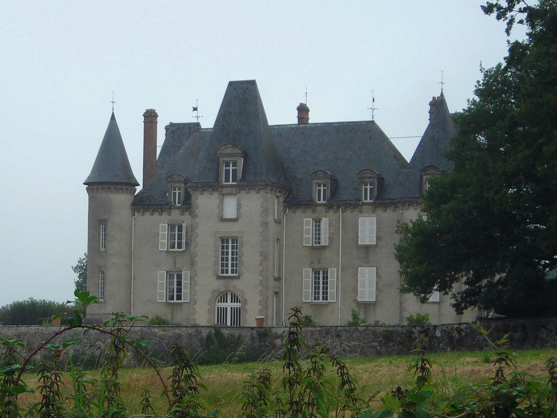 Château de la Judie, Saint-Martin-le-Vieux, Haute-Vienne.